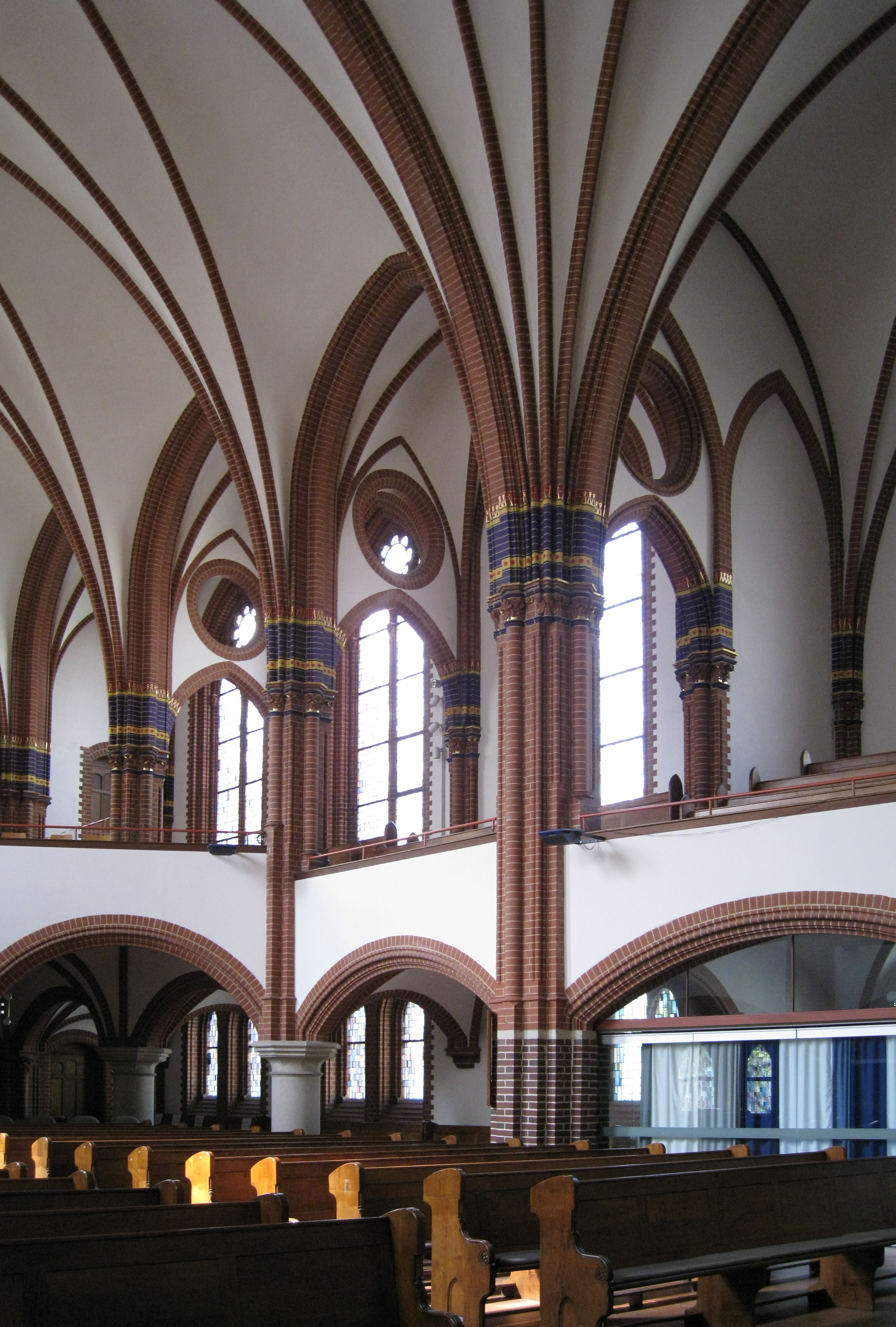 Pauluskirche Empore, das Gebäude ist über 100 Jahre alt.